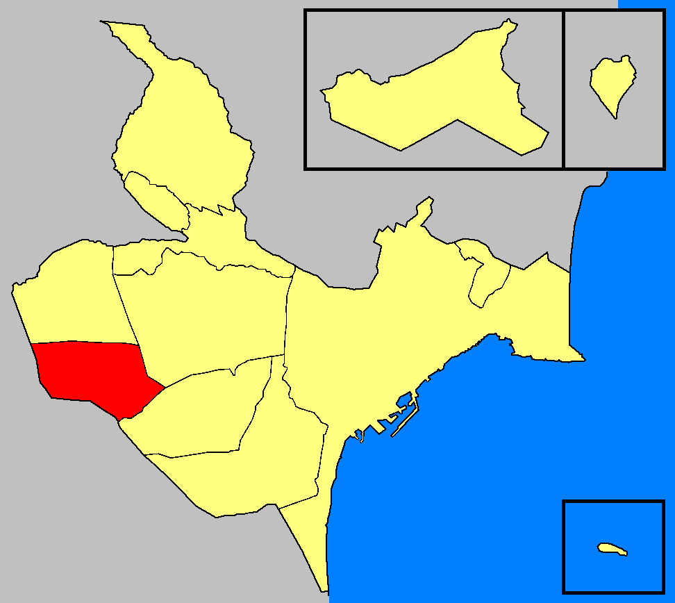 Entidades de población del término municipal de Alicante